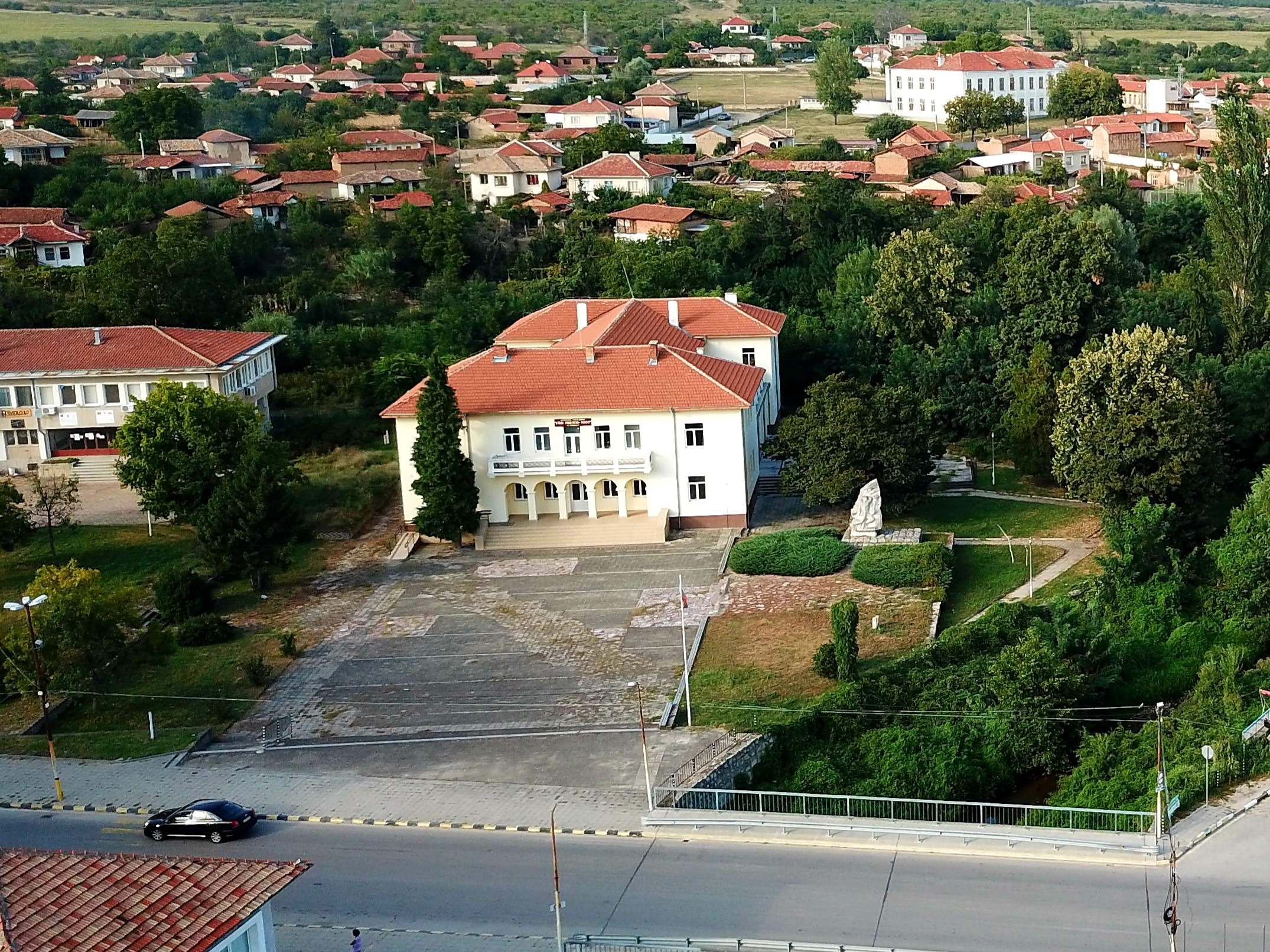 Читалище „Гео Милев“